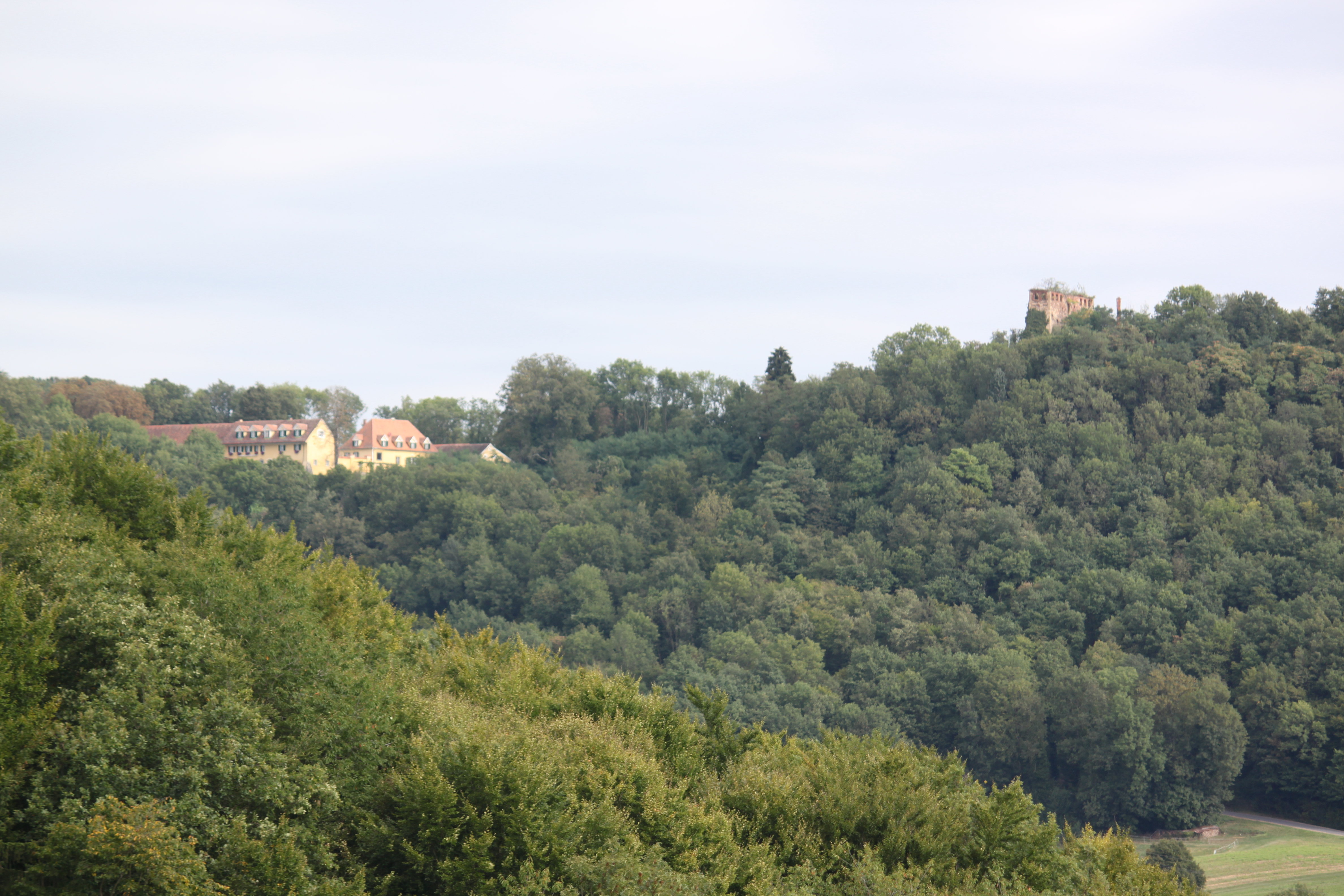 Rechts Burgruine Neu-Gleichenberg, Links davon die Meierei